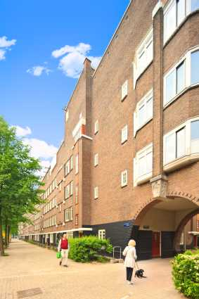 Olympiacomplex Olympiaweg Marathonbuurt Amsterdam-Zuid Ymere